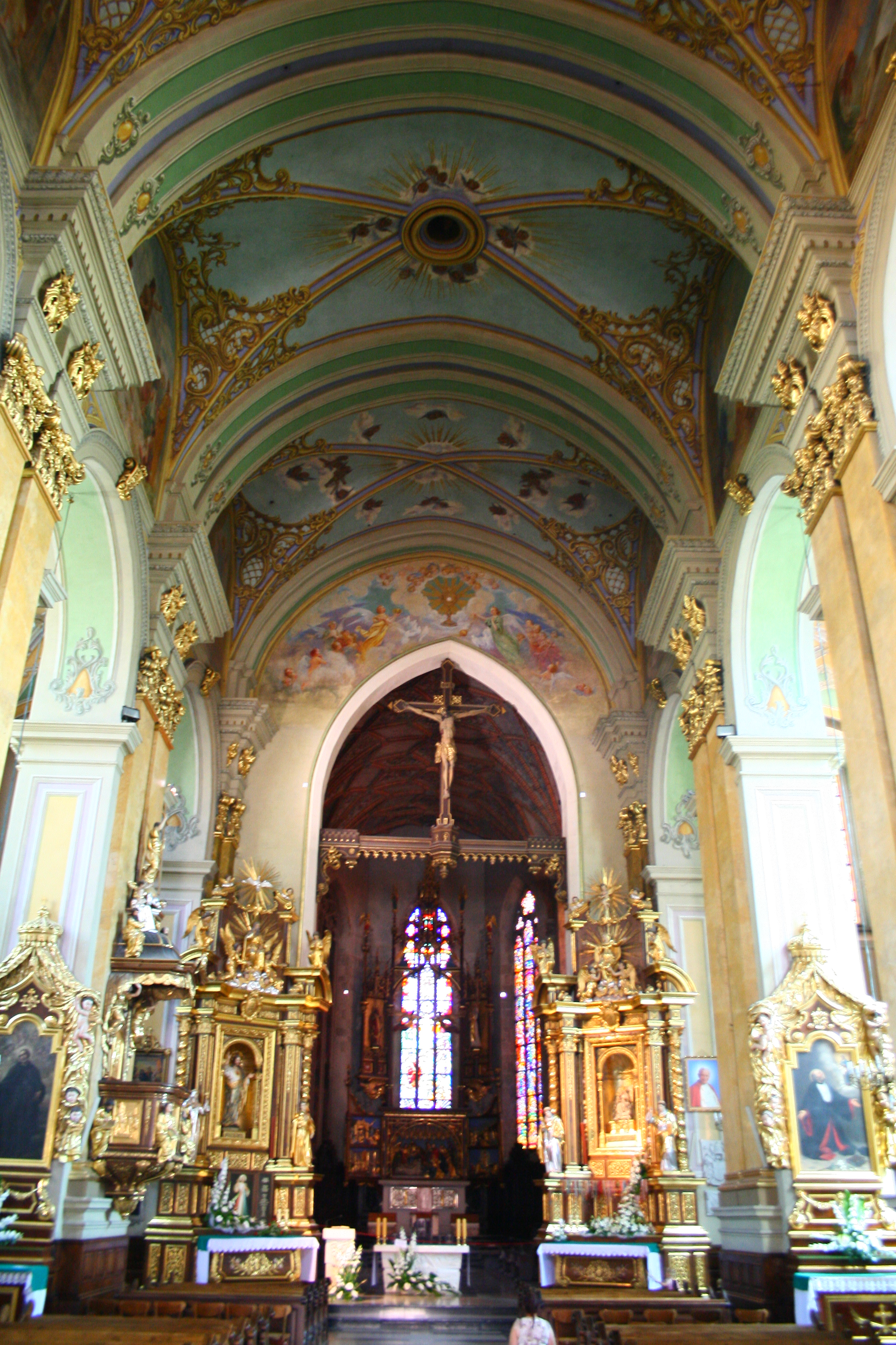 Bazylika archikatedralna Wniebowzięcia Najświętszej Maryi Panny i św. Jana Chrzciciela w Przemyślu.